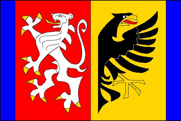 Vlajka obce Předměřice nad Jizerou